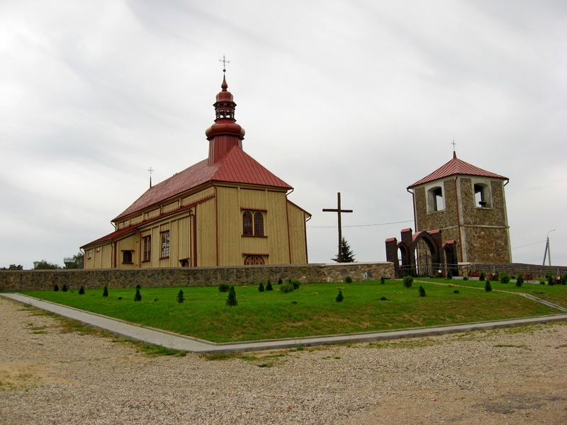 Адэльск. Касцёл Унебаўзяцця Найсвяцейшай Дзевы Марыі